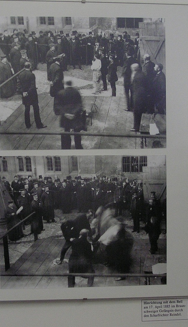 Hinrichtung eines Verurteilten auf der Richtbank mit einem Richtbeil durch den Scharfrichter Friedrich Reindel in der Haftanstalt Braunschweig